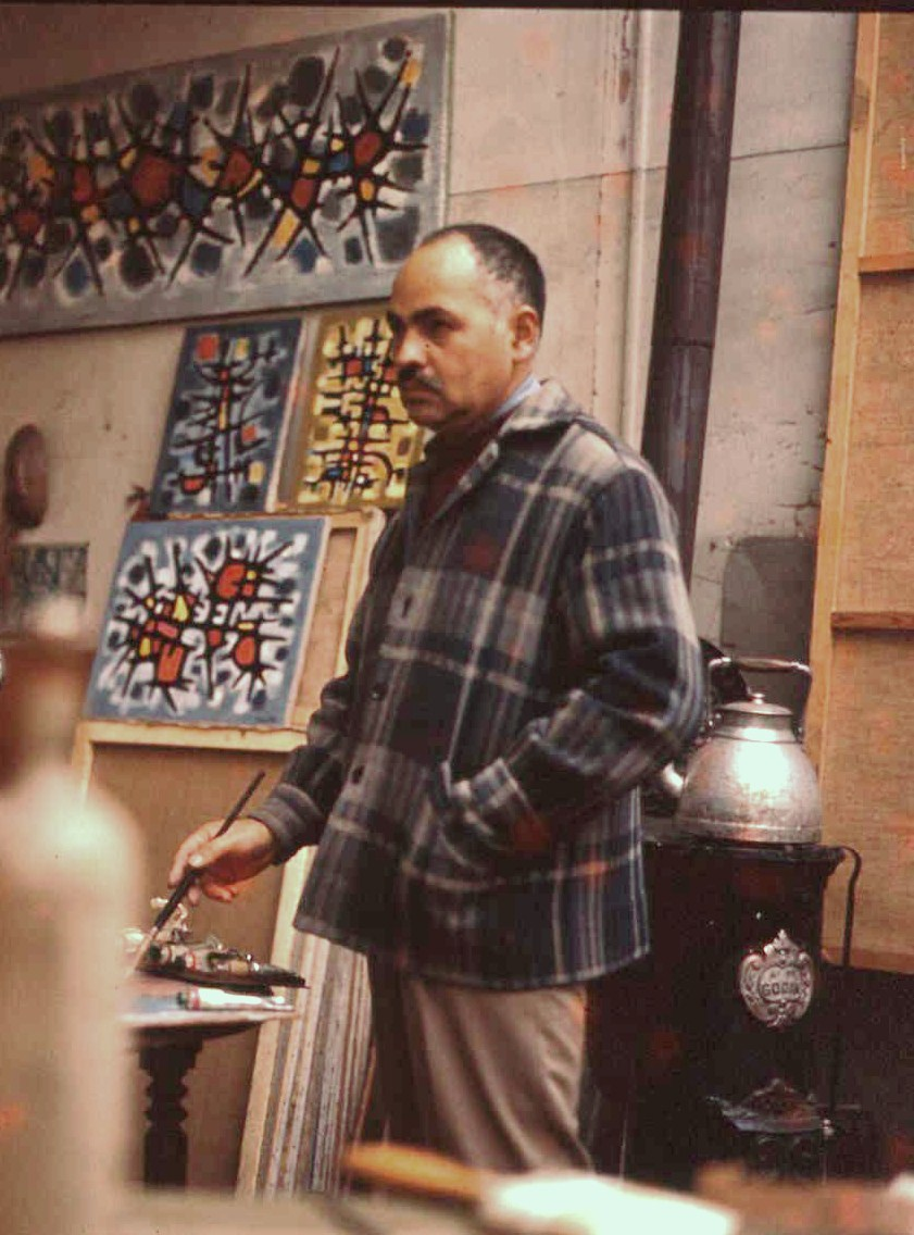 Le peintre Eudaldo dans son atelier à Paris, fin des années 1950.